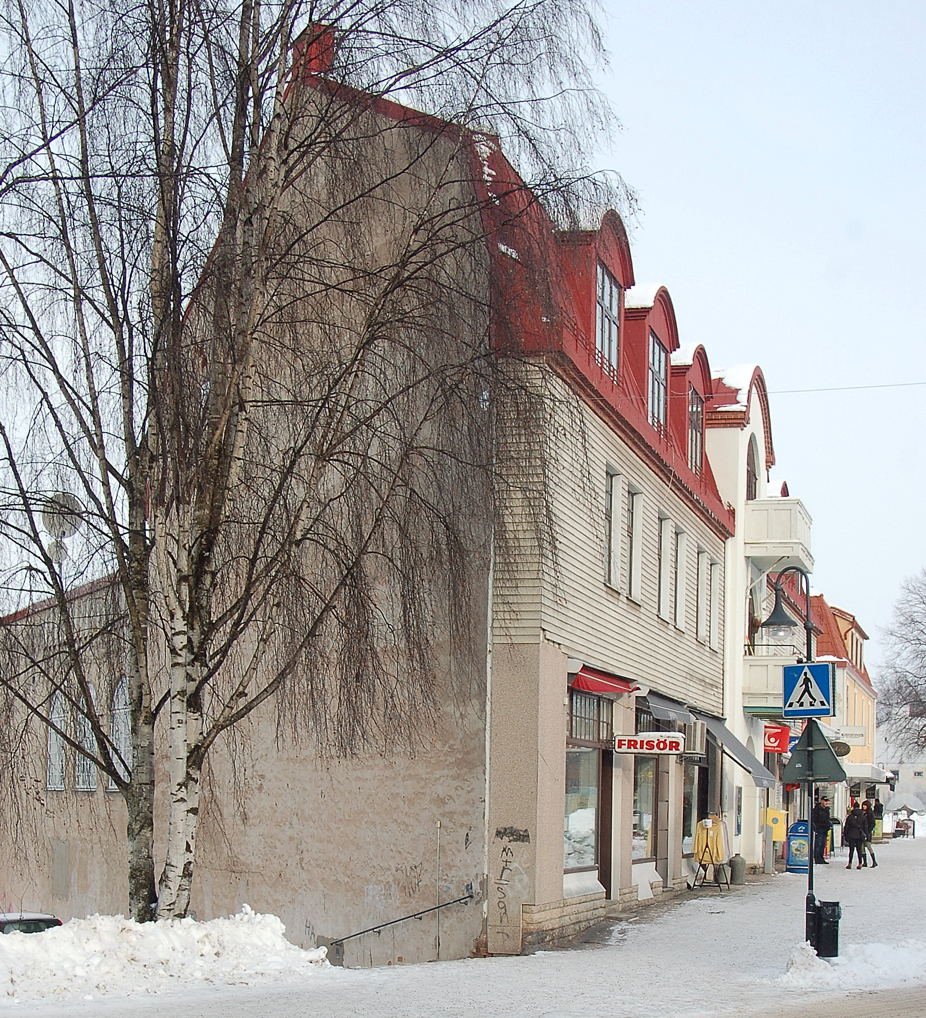 Biografhuset i Sunne.